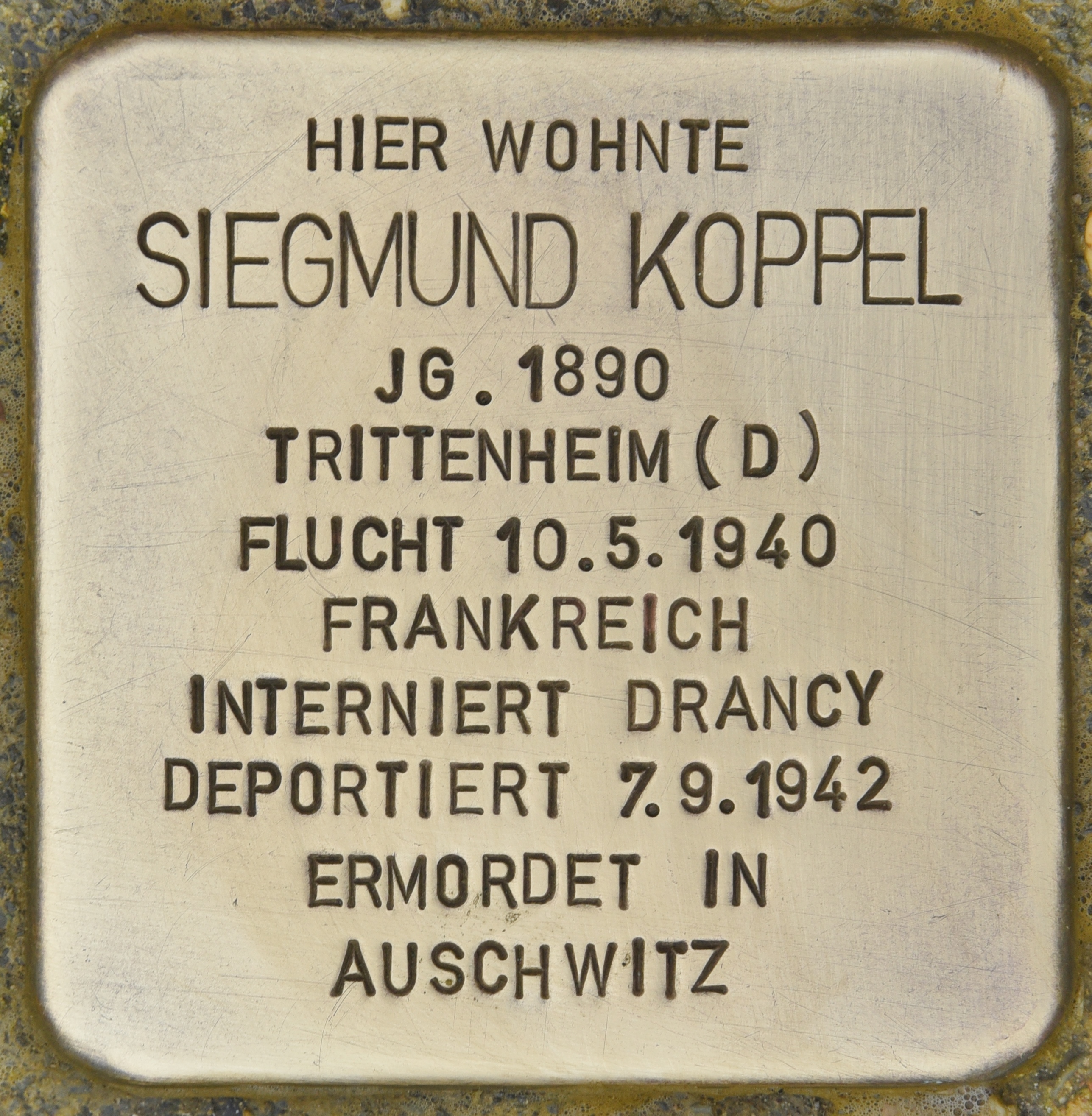 Stolperstein für Siegmund Koppel